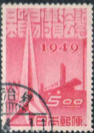 1949年に神奈川県横浜市で開催された日本貿易博覧会を記念して発行された郵便切手。